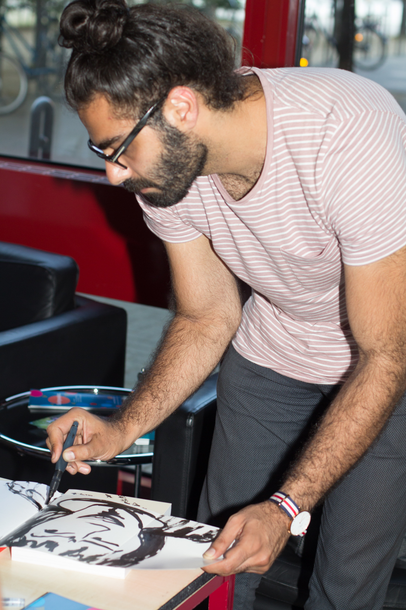 Hamid Sulaiman 2017 in Köln, Buchvorstellung "Freedom Hospital"